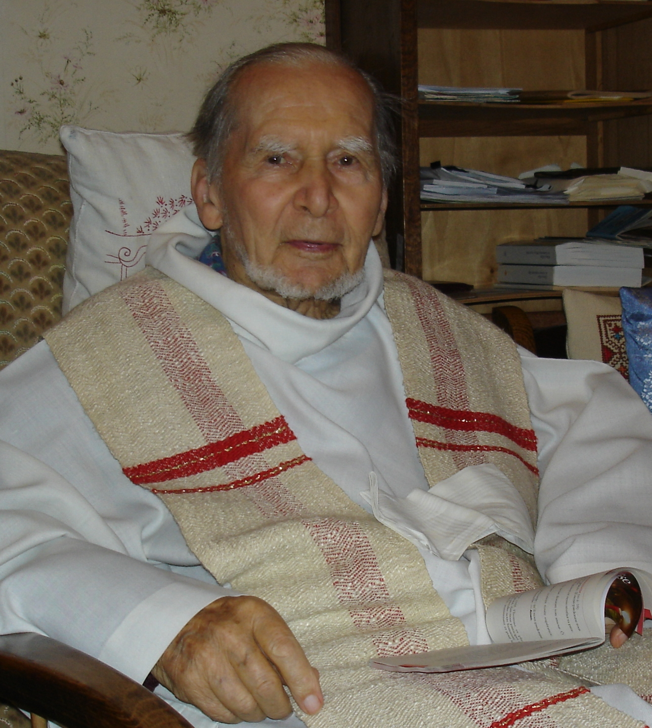 Joseph Pyronnet pretre Noel2009